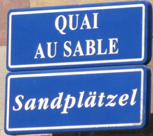 Zweisprachiges Straßenschild in Straßburg (Französisch und Elsässisches Deutsch).